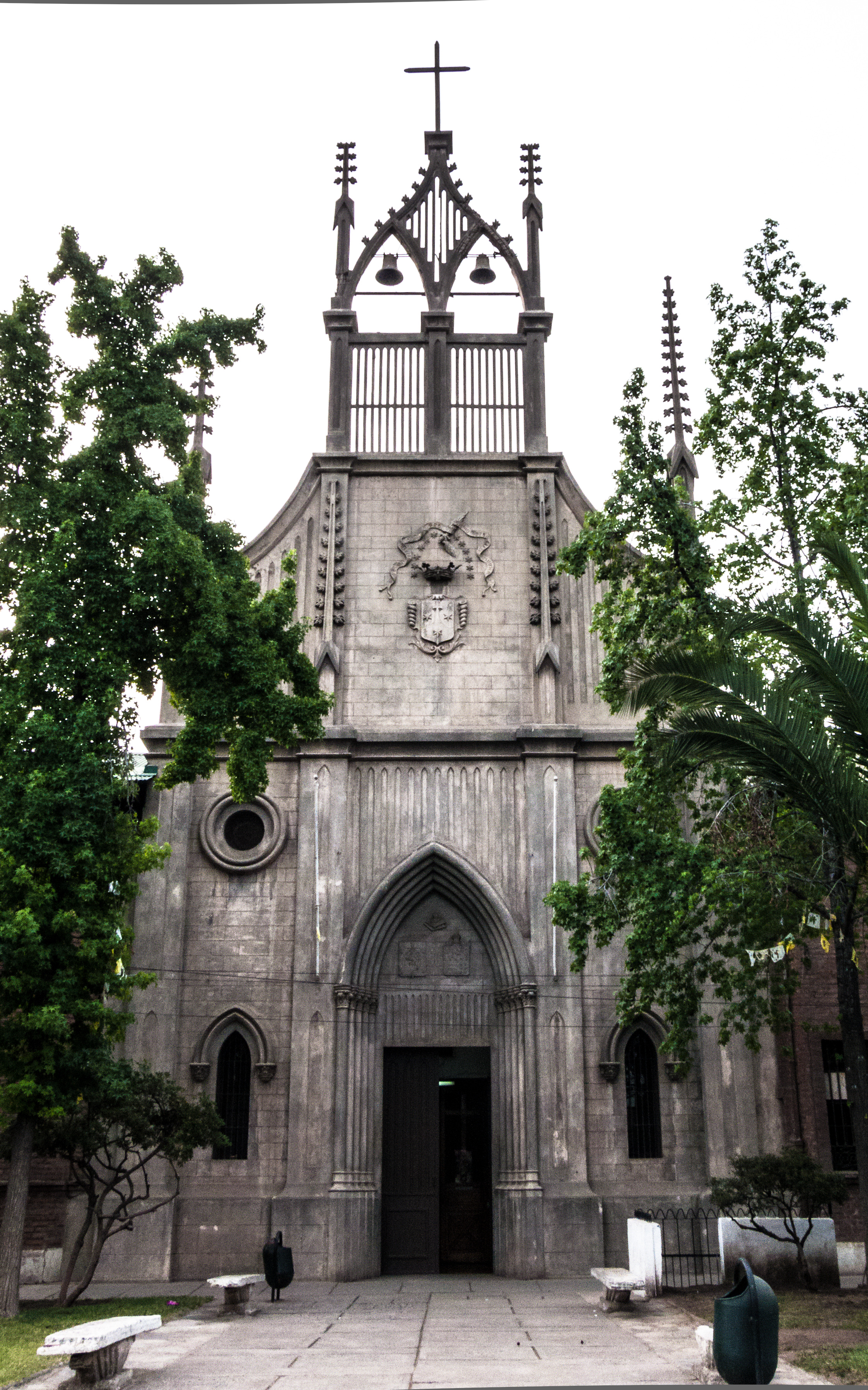 frontis del monasterio